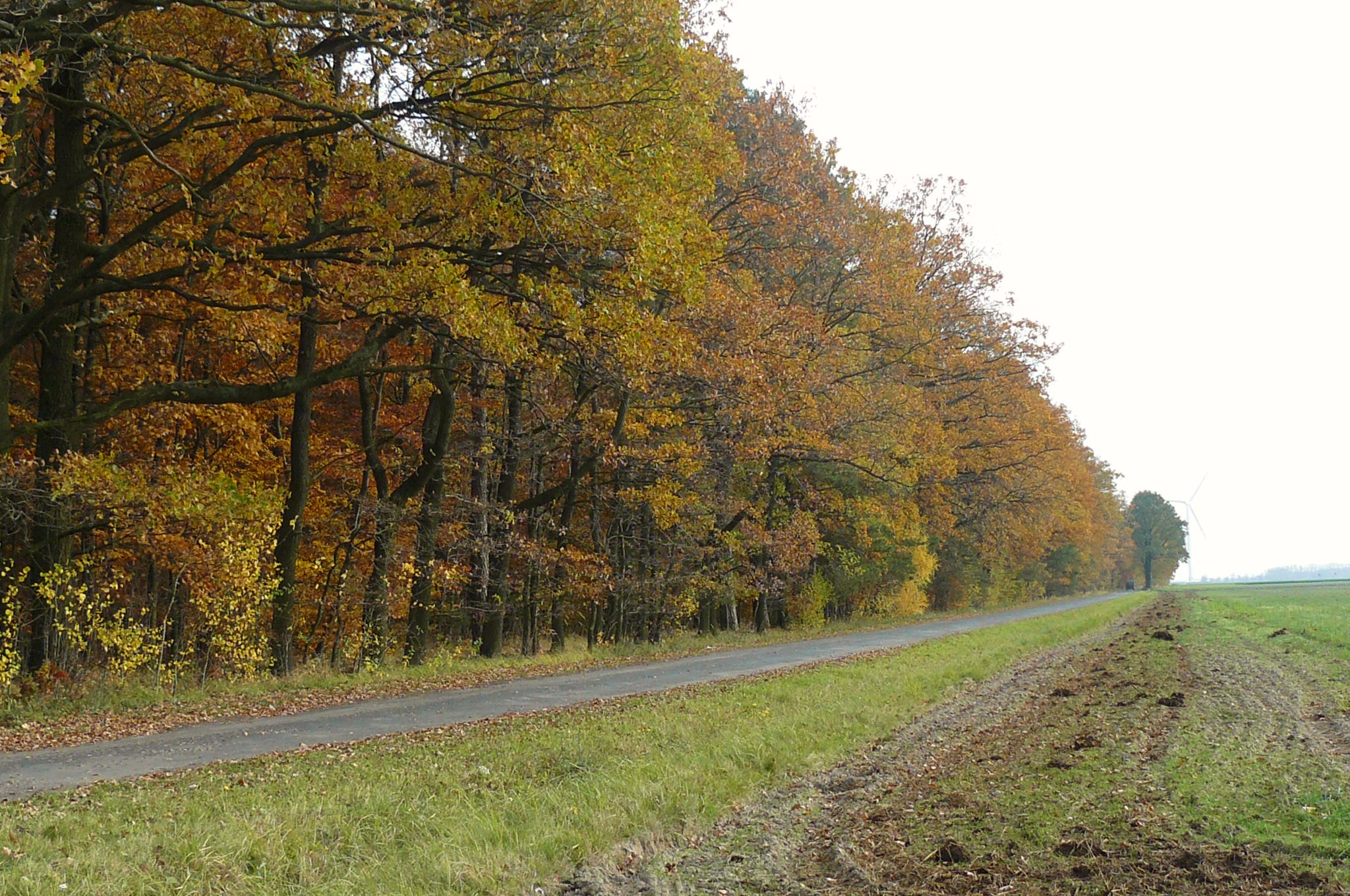 Elęcin. Gmina Pępowo.